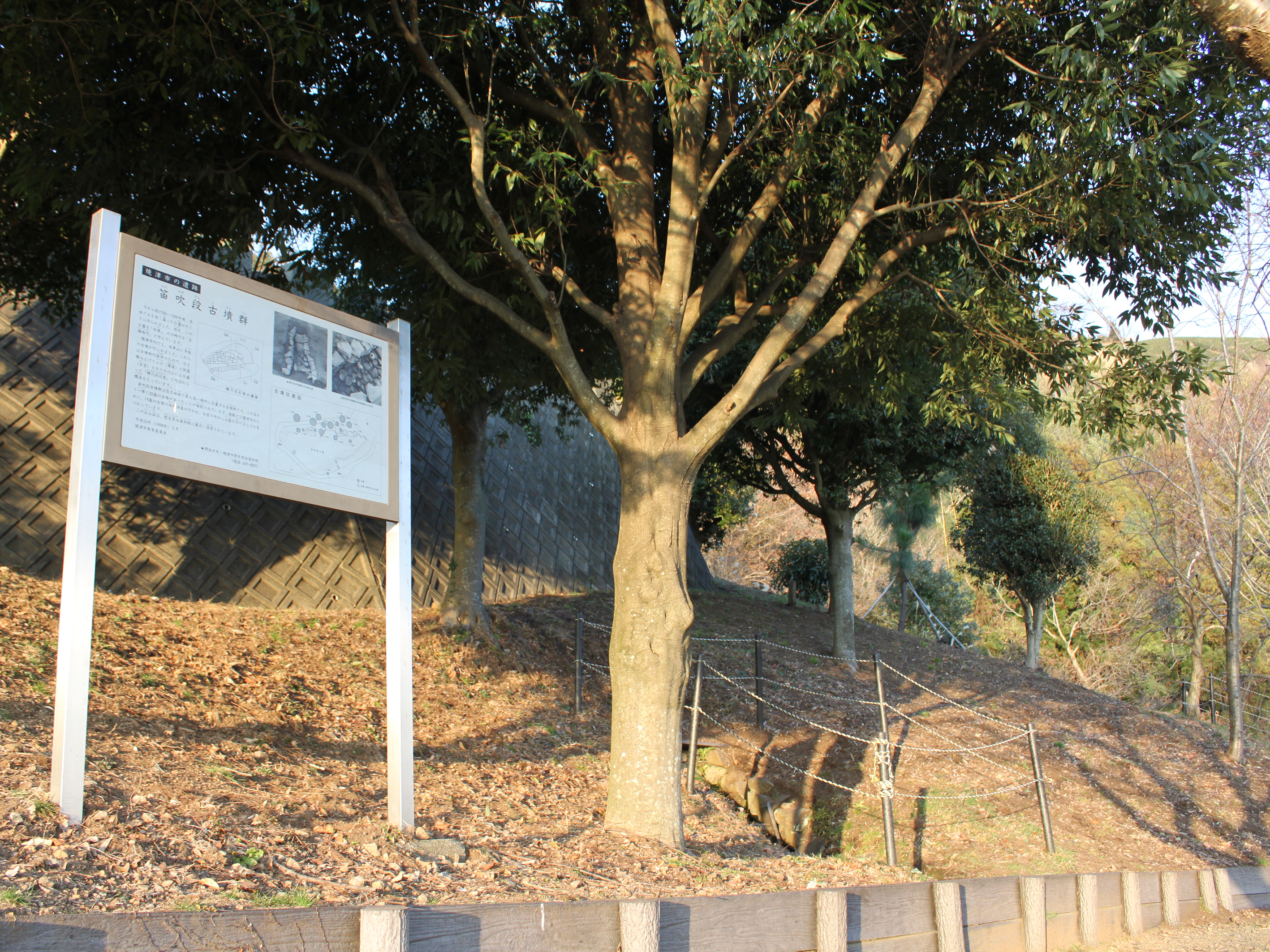 静岡県焼津市の古墳